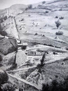 Standseilbahn, die für den Bau der Lose 3 und 4 der Pajares-Nordrampe errichtet wurde